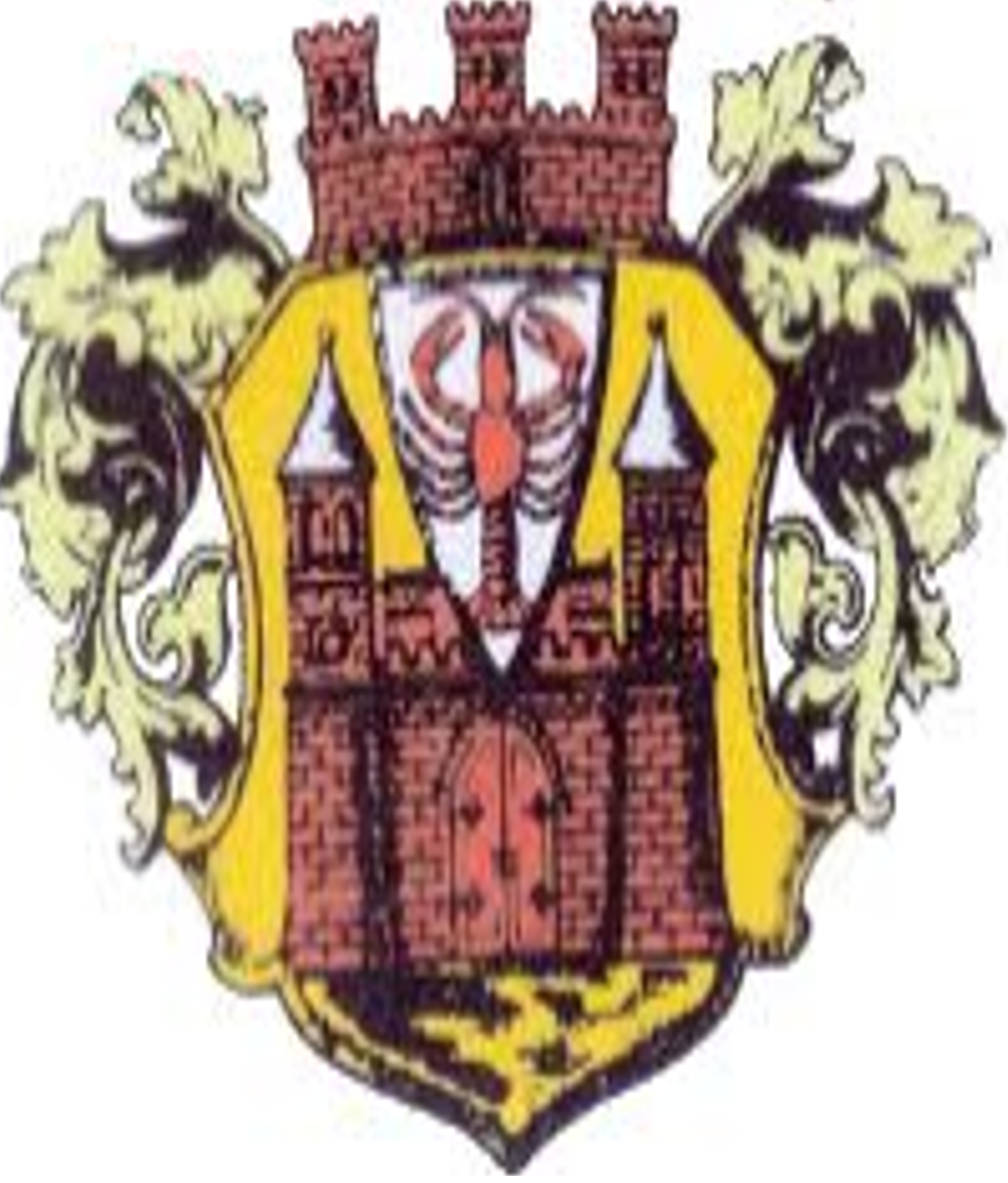 Wappen-Cottbus, vor 1945